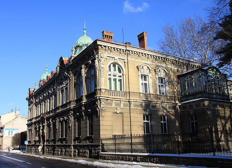 Budynek Pedagogicznej Biblioteki Wojewódzkiej w Bielsku-Białej